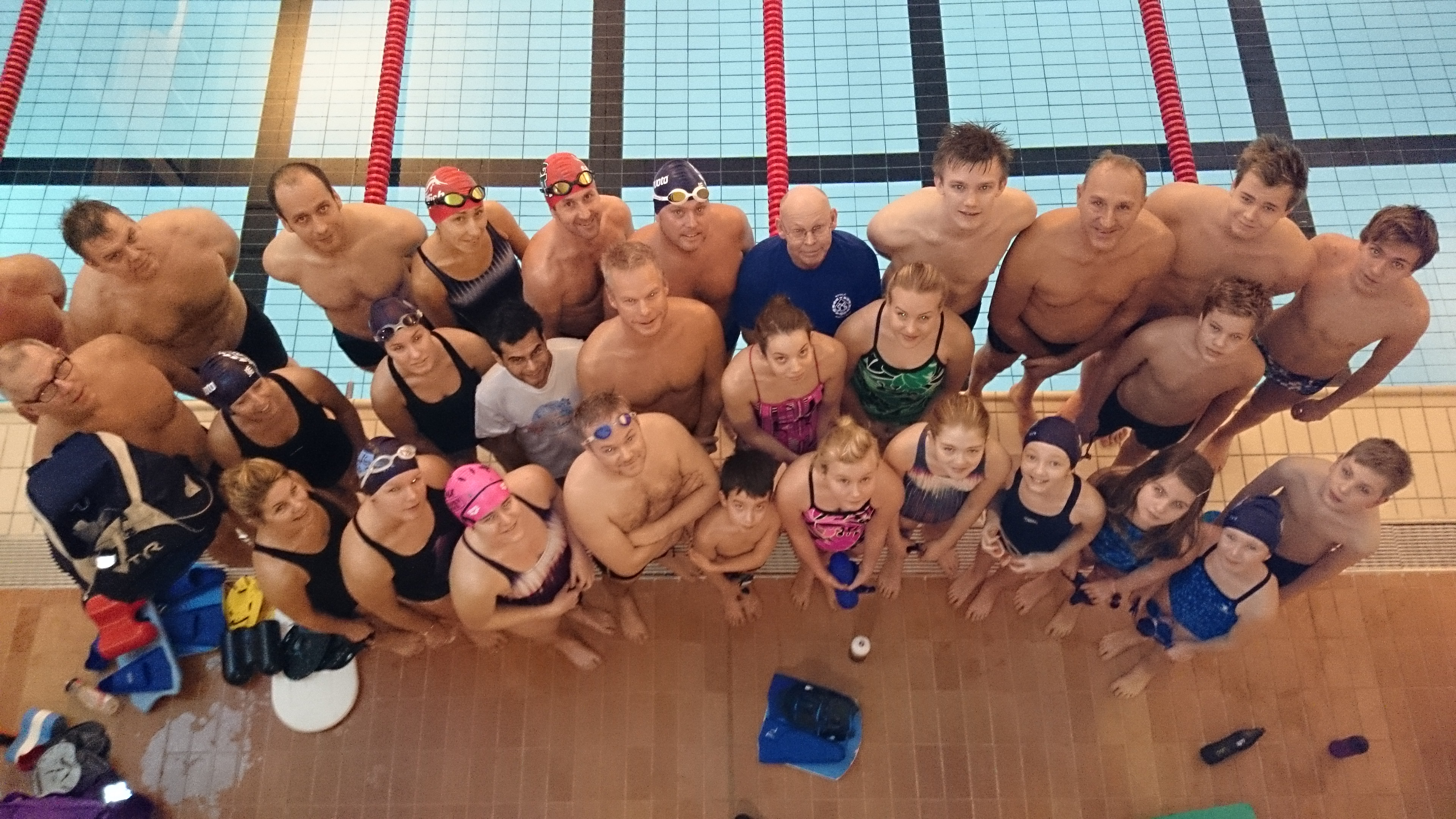 MSS -Träning, tävlingar, gemenskap och glädje!